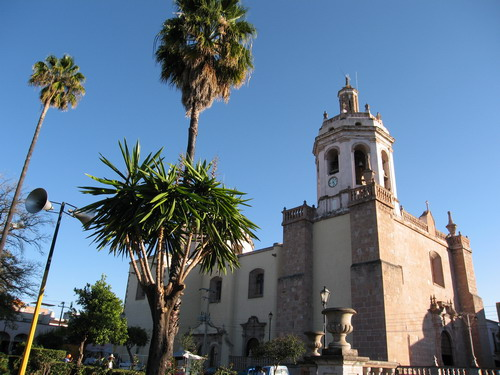 Photo of main temple in Tlaltenango, Zacatecas Foto del templo principal de Tlaltenango, Zacatecas